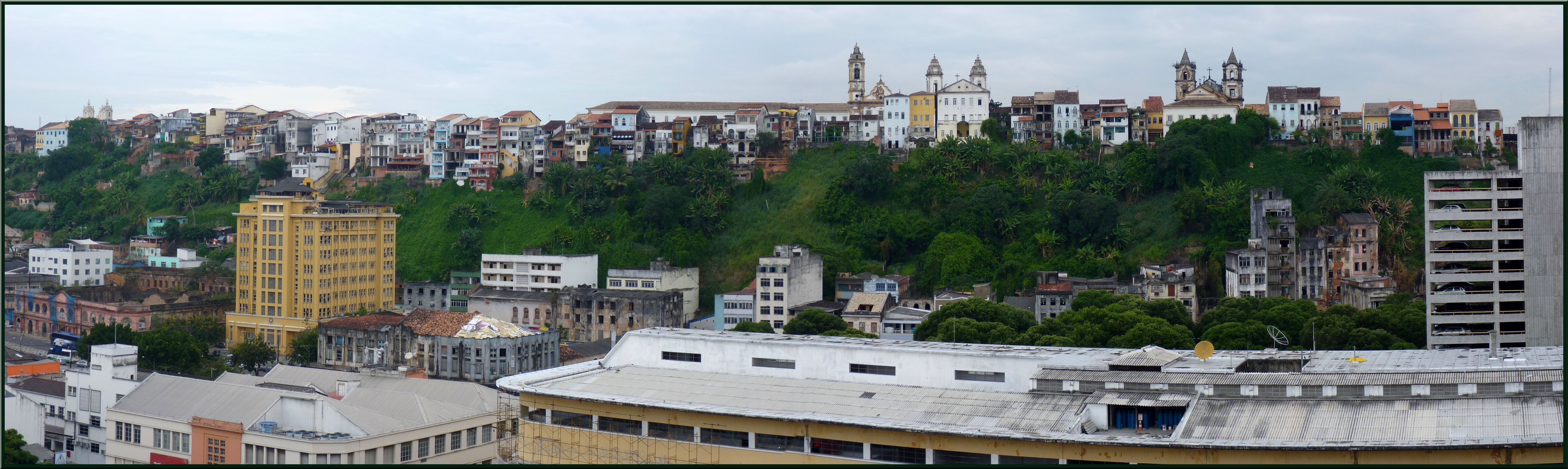 Salvador - el Pelourinho